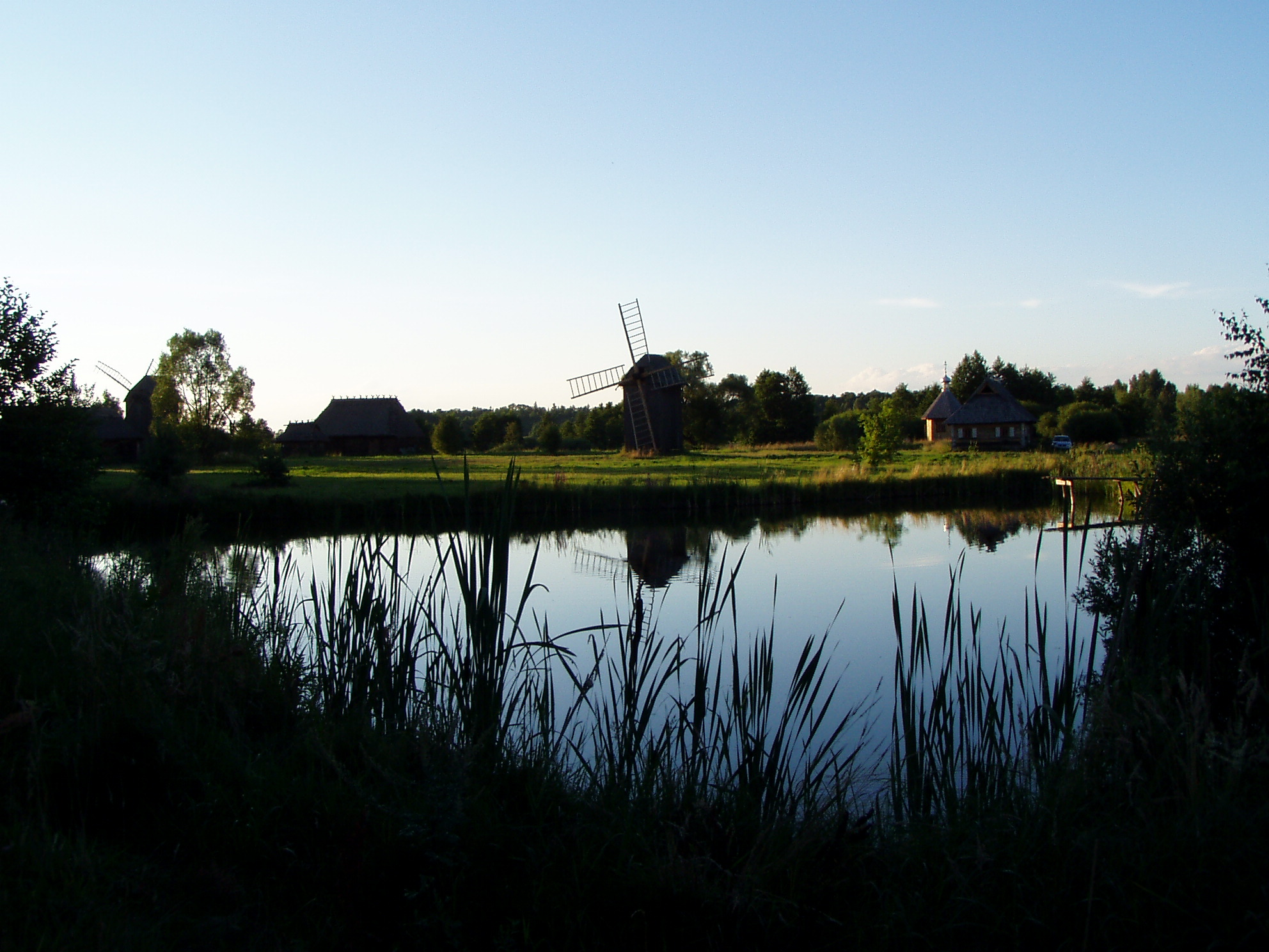 Skansen w Białowieży.